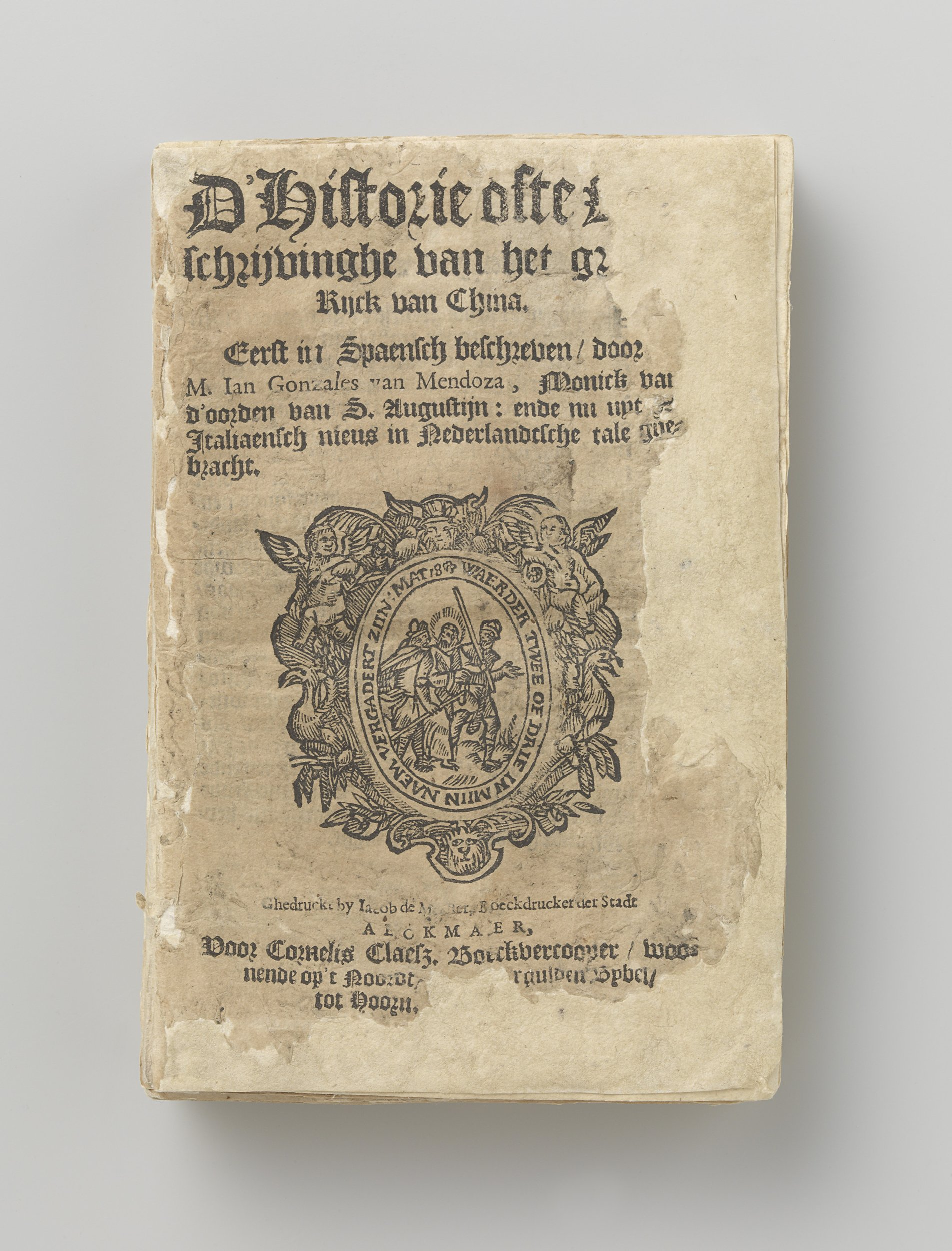 Boekje in bruin-rode losse (te kleine) perkamenten omslag, klein octaaf, in de vorm van een zakboekje. Het gaat over China, oudste Nederlandse editie, in Hoorn uitgegeven door Cornelis Claesz. Titel: "D' Historie ofte Beschrijvinghe van het groote Rijck van China". Eerst in Spaensch beschreven door M. Ian Gonzales van Mendoza, Monnick van d'oorden van S. Augustijn: ende nu uyt het Italiaenisch nieus in Nederlandtsche tale ghebracht...".